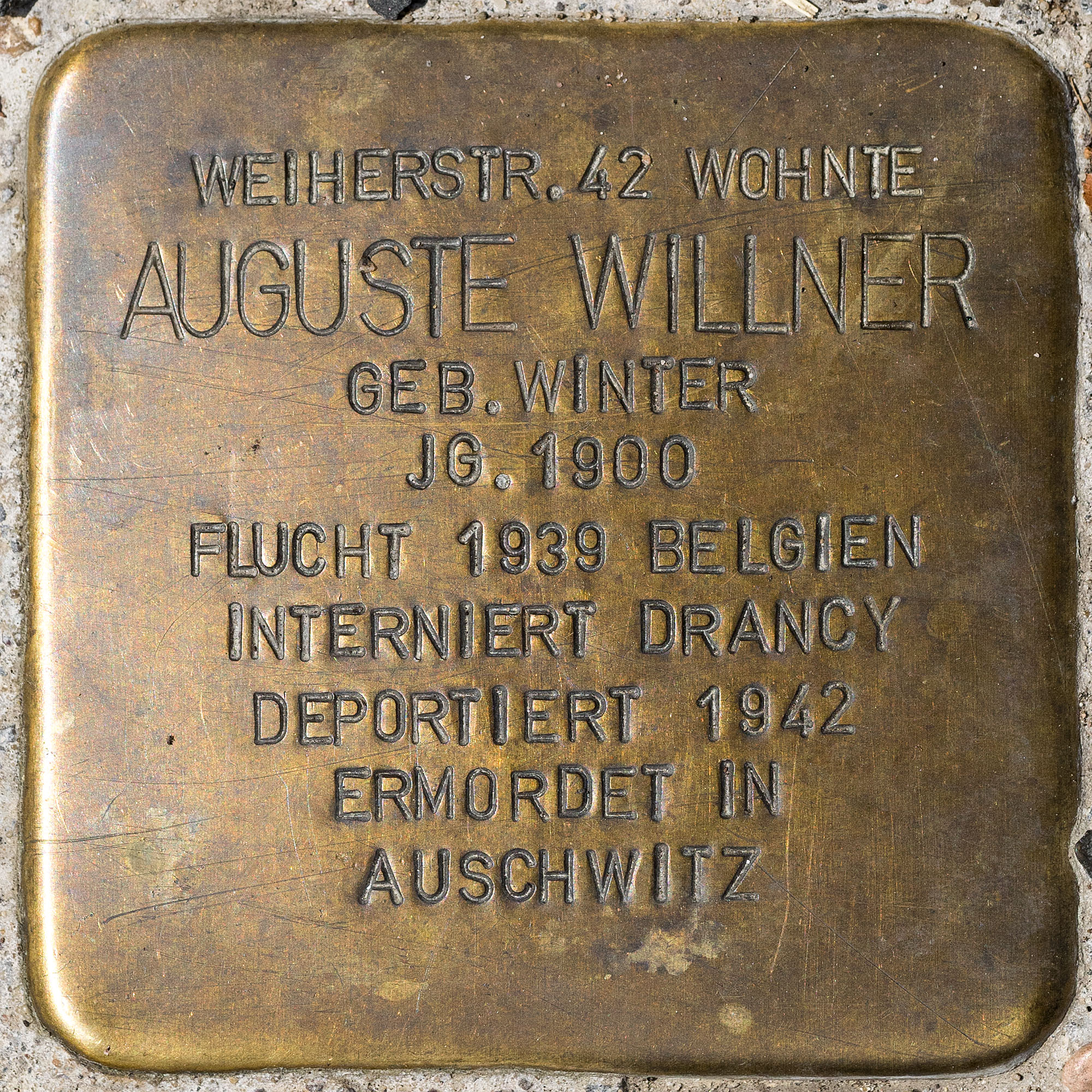 Stolpersteine MG: Willner, Auguste